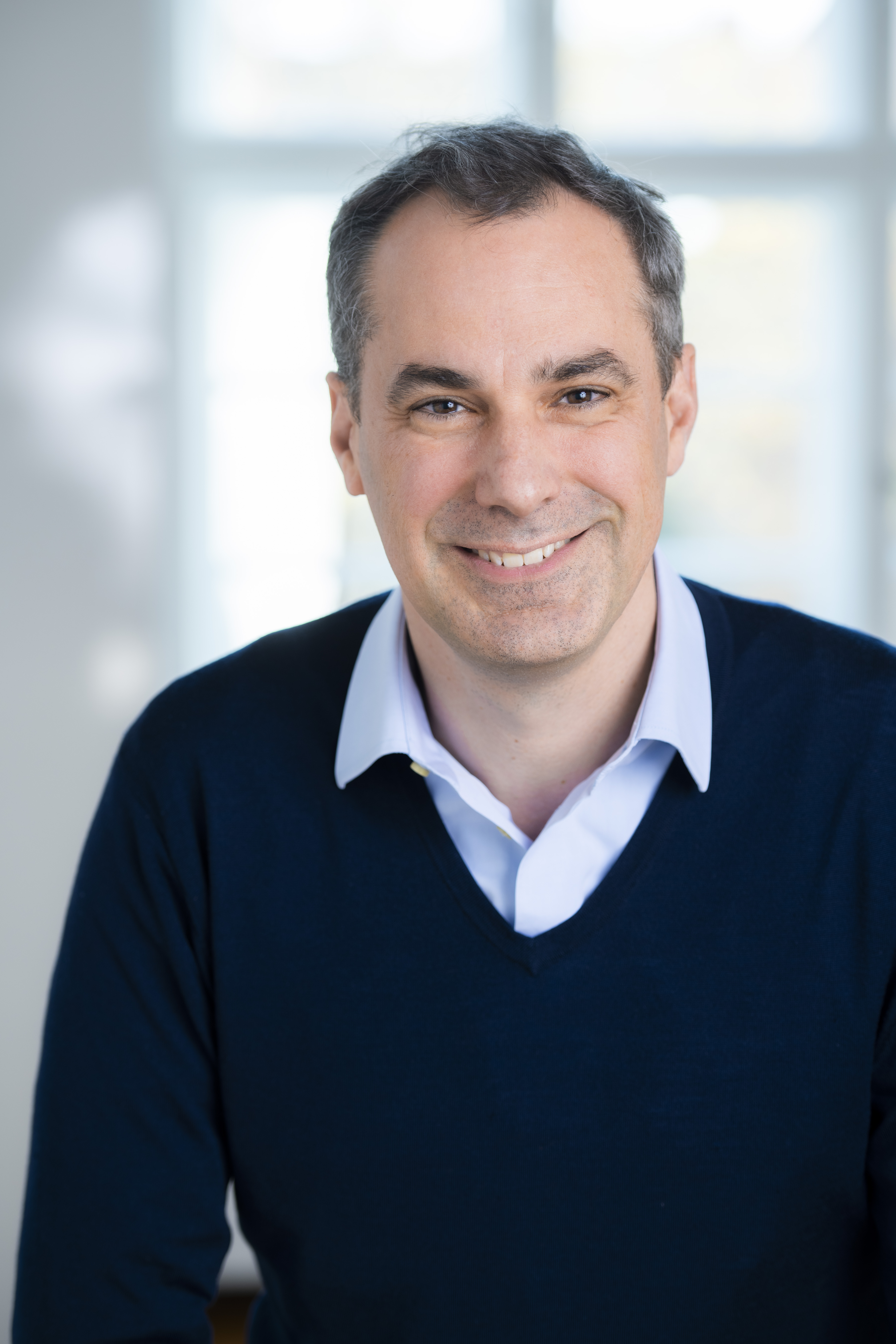 Member of the Managing Board of Siemens AG and CEO Smart Infrastructure